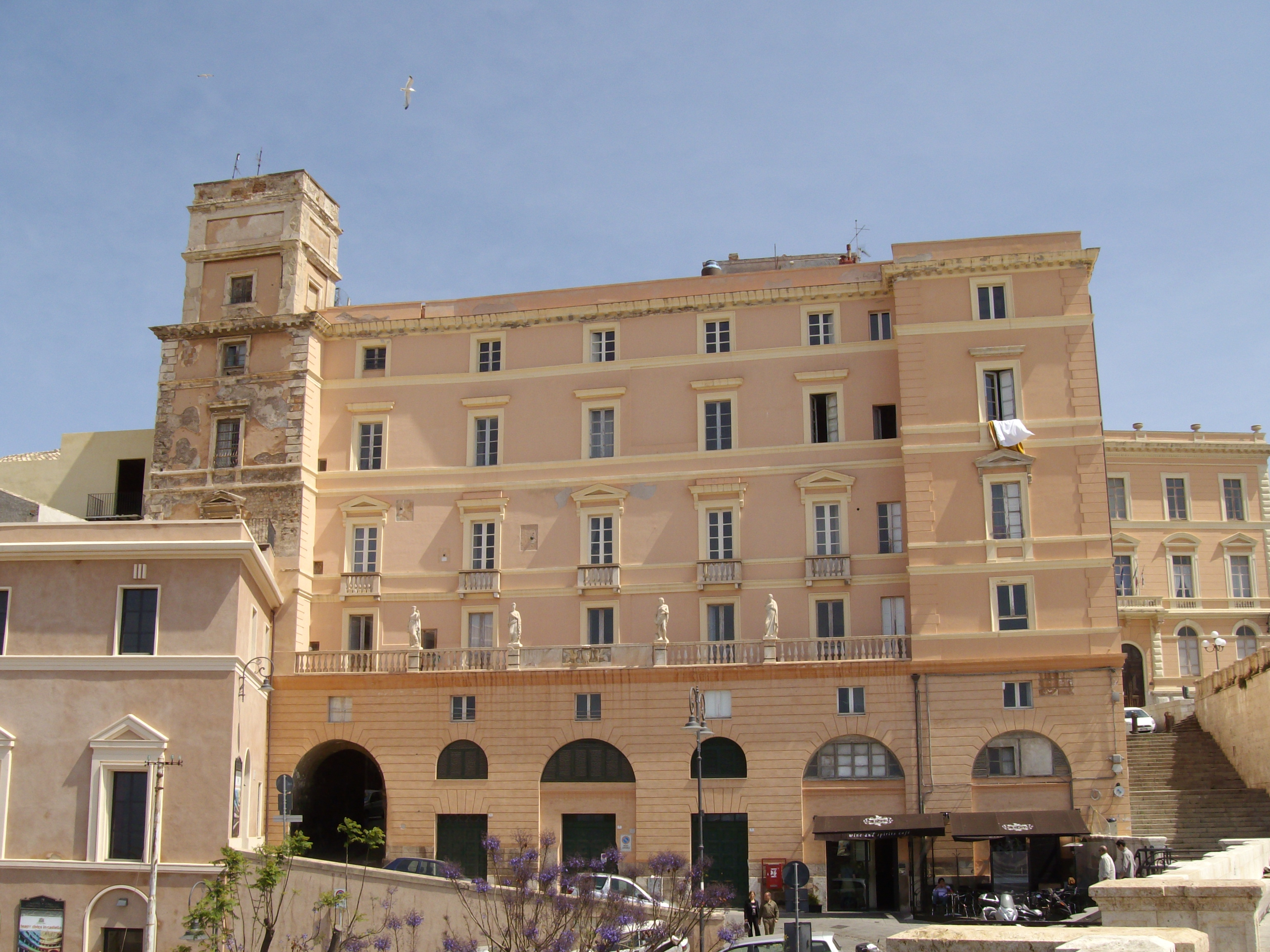 Palazzo Boyl (XIX secolo) - Cagliari